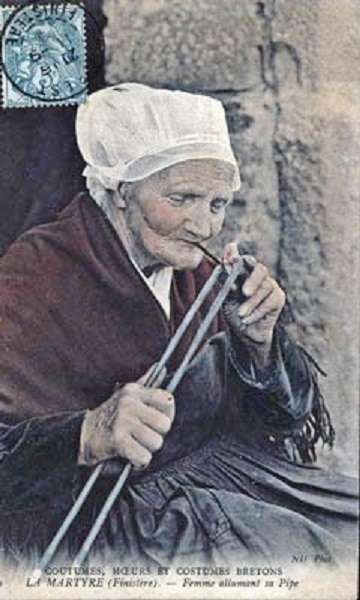 La Martyre : Femme allumant sa pipe (carte postale, début XXème siècle, auteur inconnu)